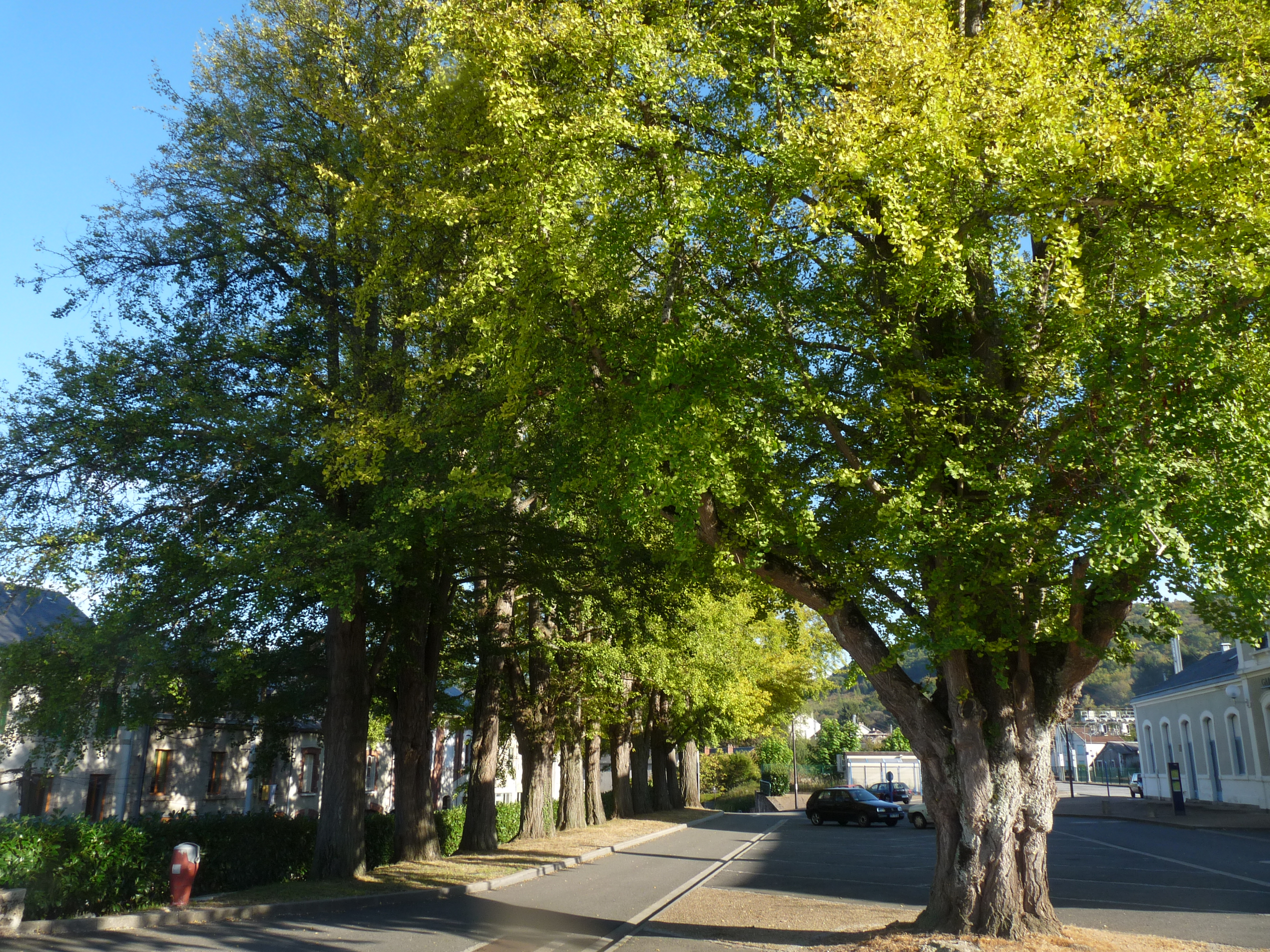 Photo des 12 ginkgo du parking de la gare de Saint-Sulpice-Laurière (Haute-Vienne)